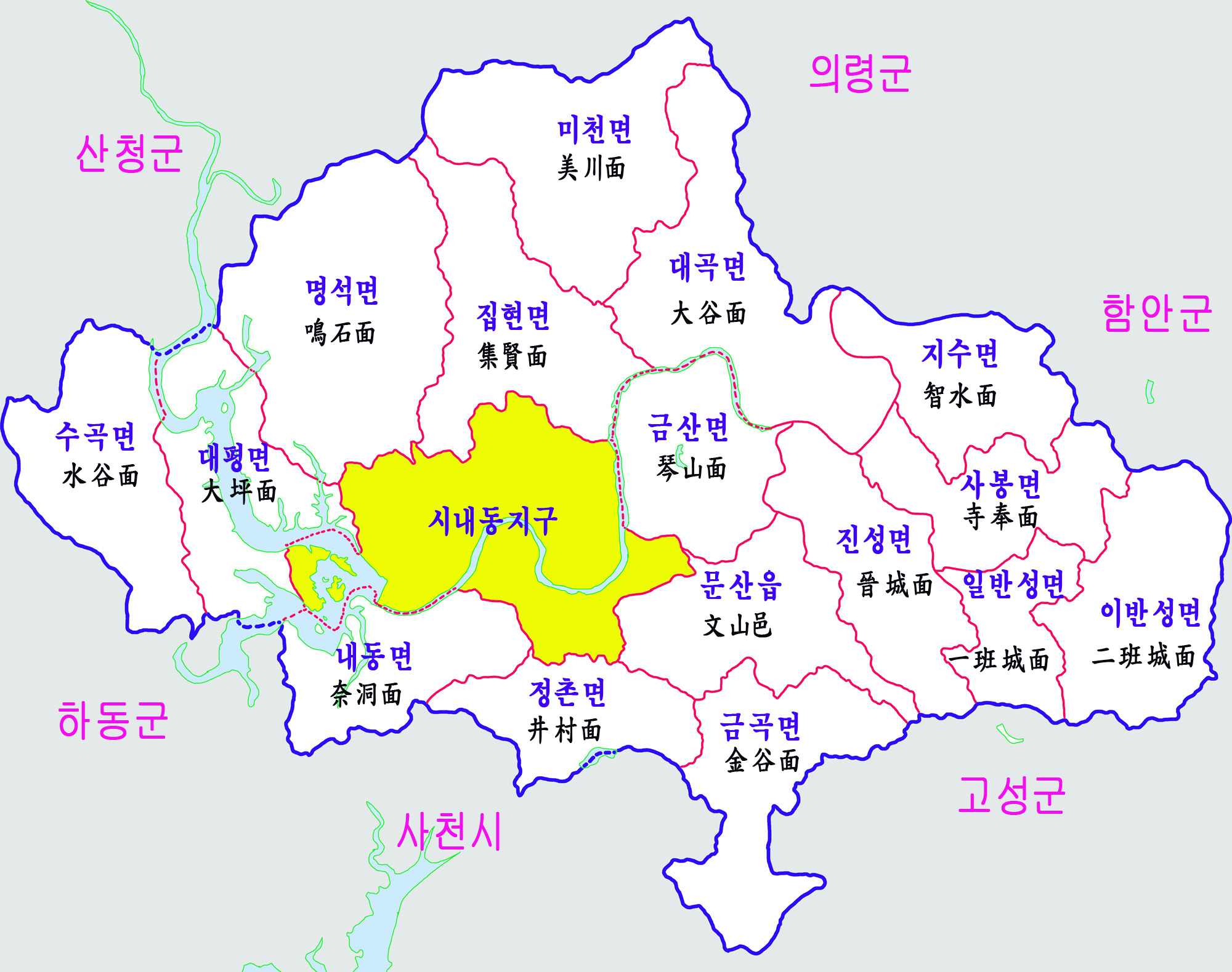 진주시 행정구역도